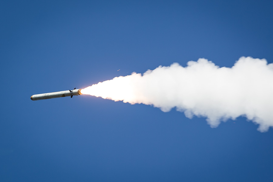 СКШУ «Восток-2014». День второй: ракетный пуск ОТРК «Искандер-М» 107-й ракетной бригады по учебной цели.